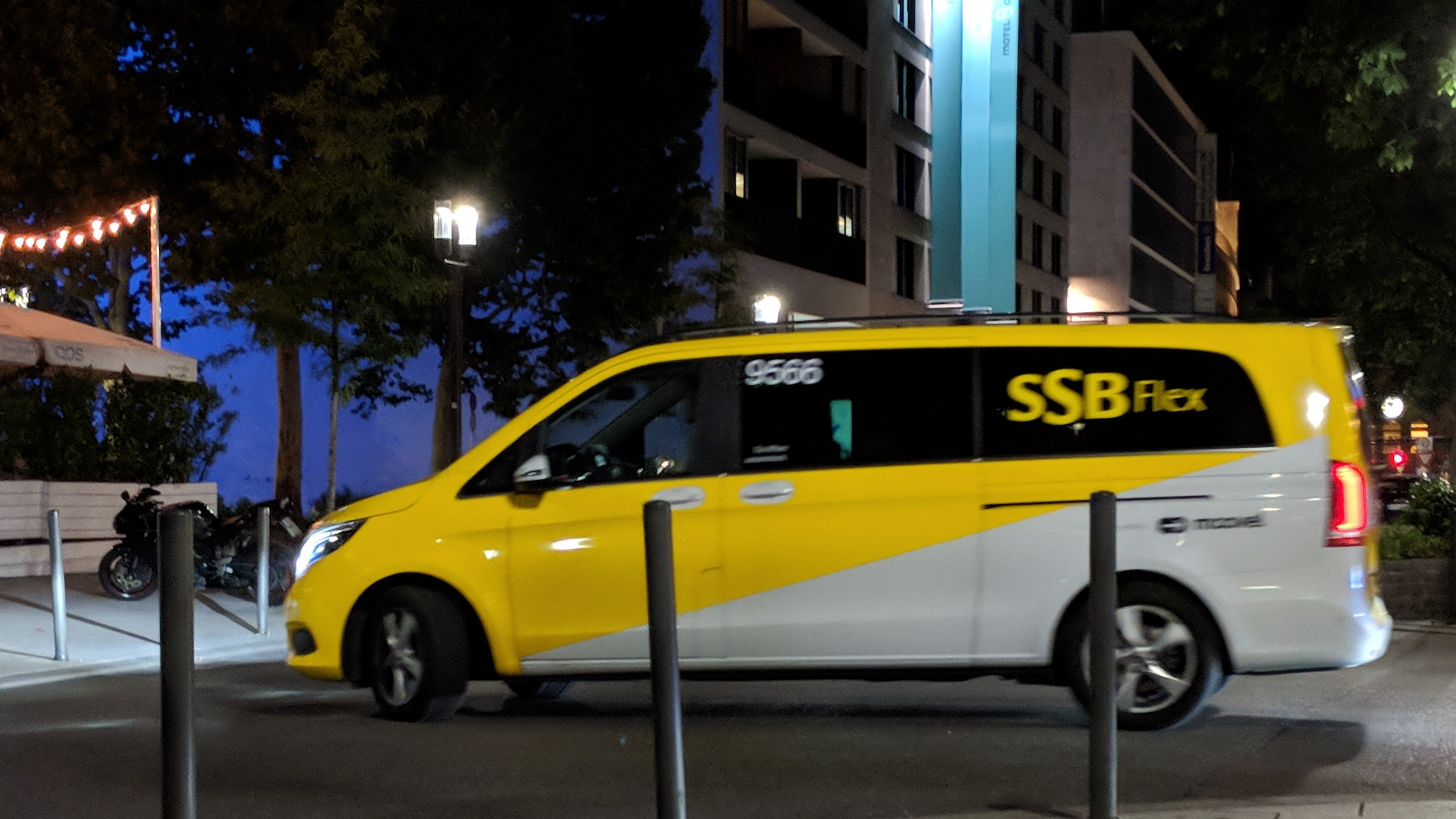 Mercedes Benz V-Klasse von SSB Flex